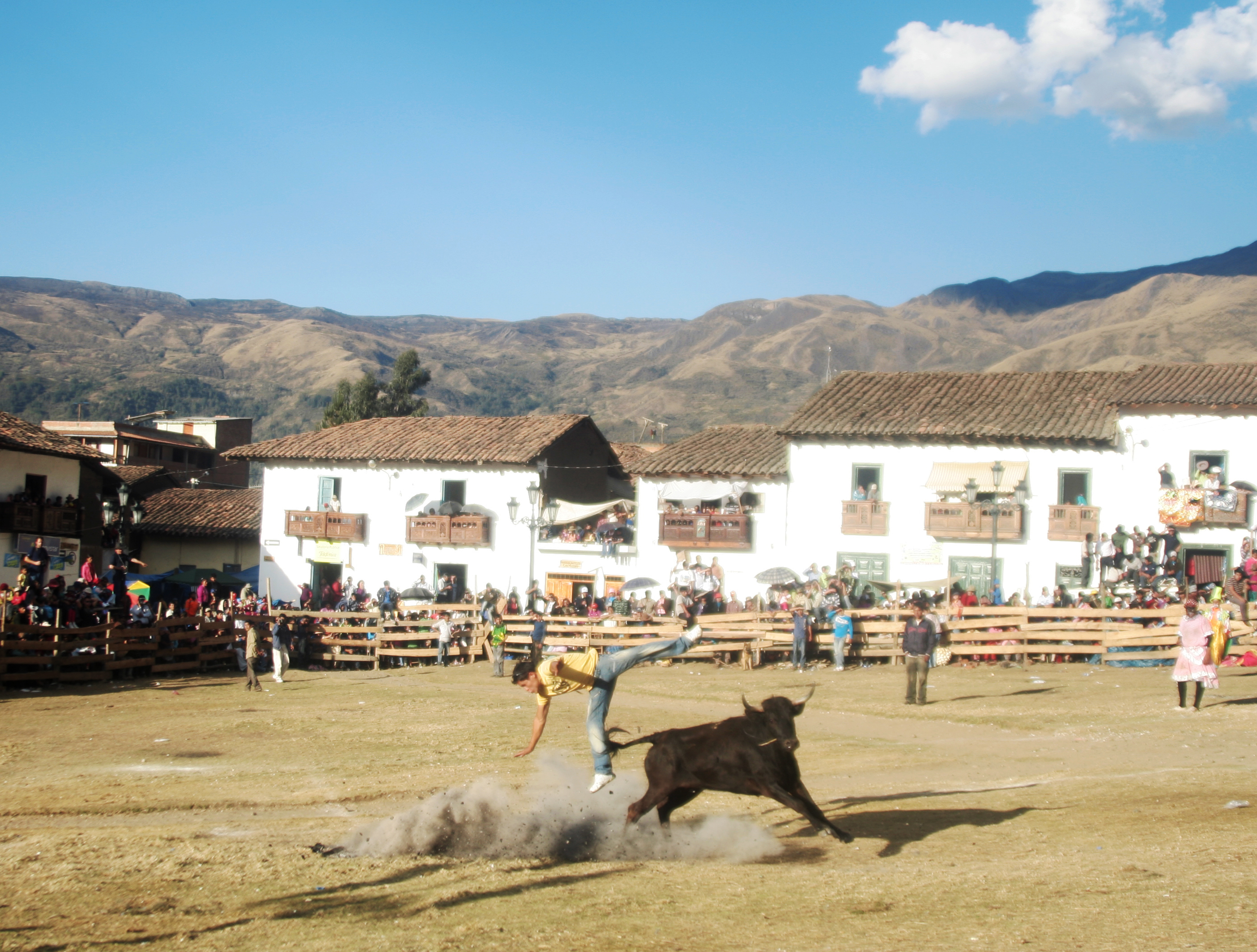 Corrida de Toros en Chacas